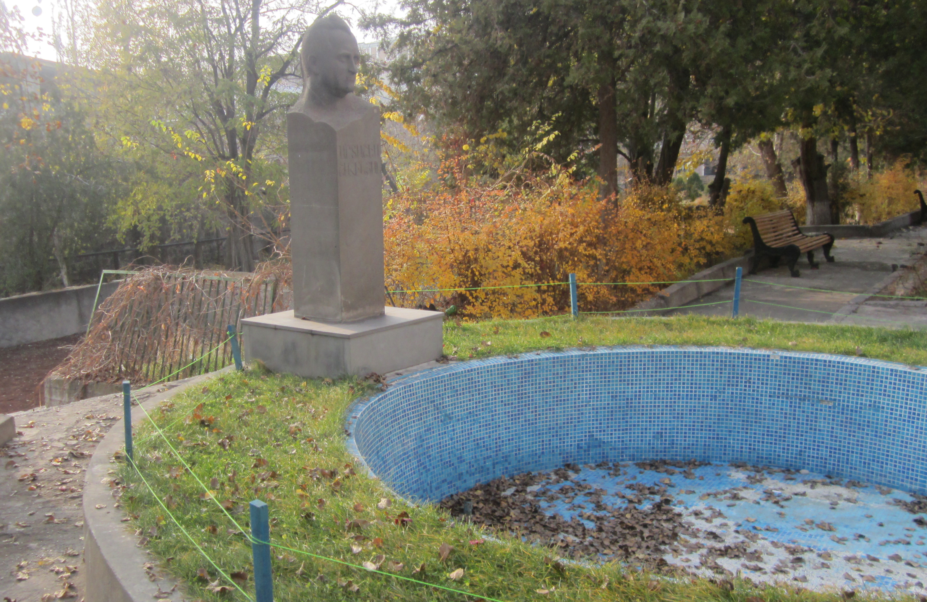 Արտաշես Շահինյանի կիսանդրին դպրոցի բակում